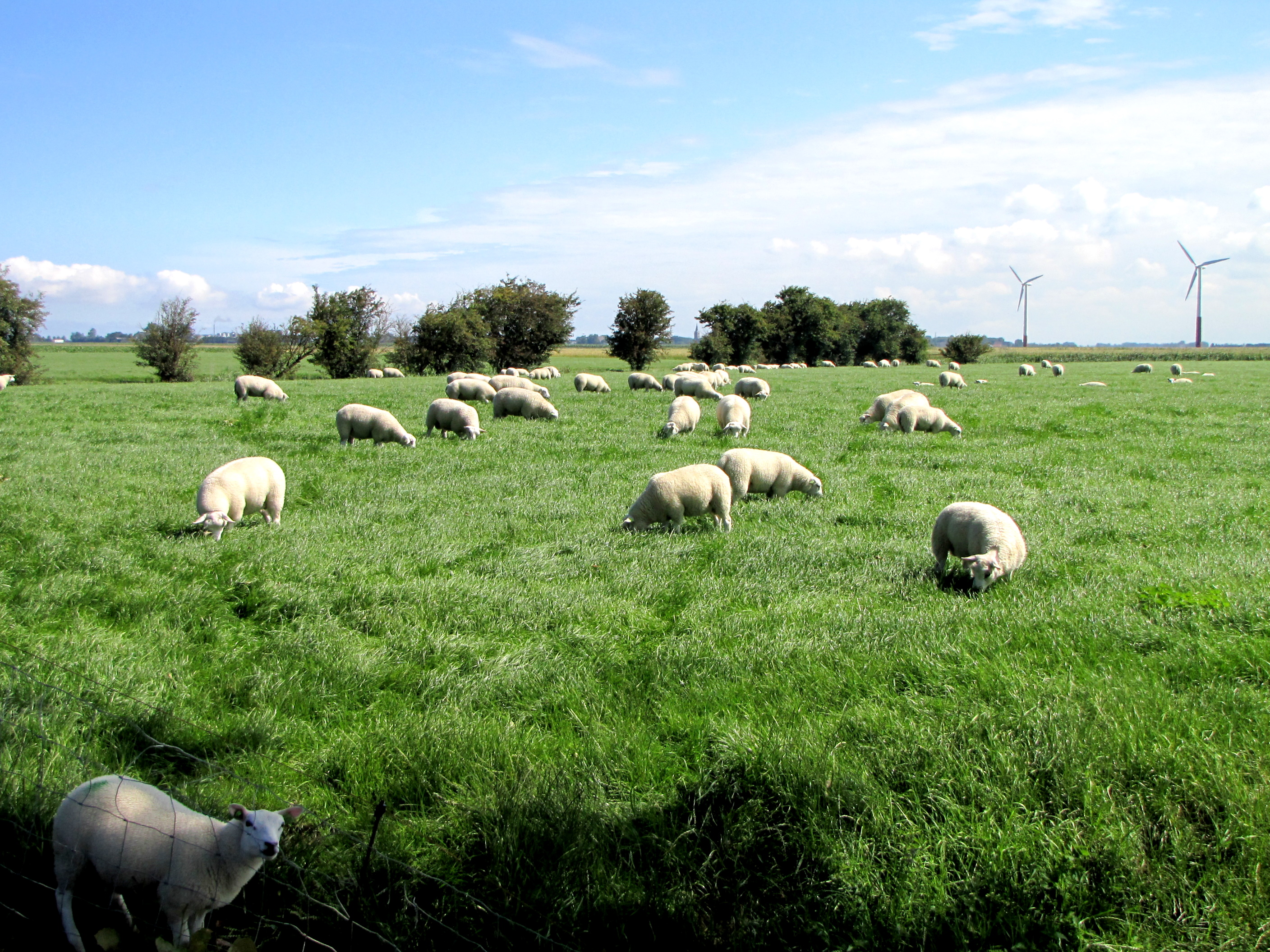 Ortseingang von Sexbierum, mit Schafen und Windrad am Horizont.